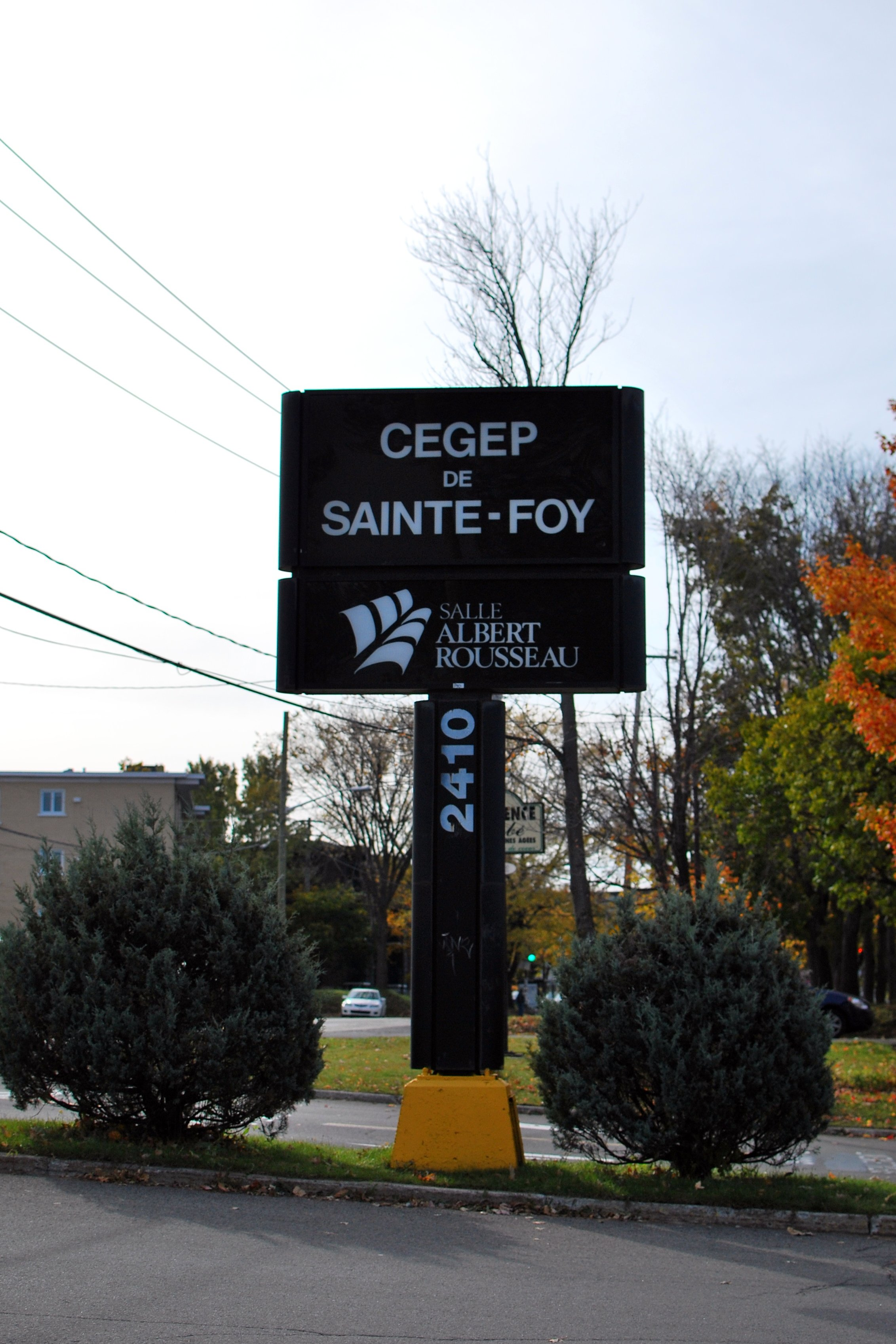 Panneau d'entrée du Cegep de Sainte-Foy (Québec, Québec, Canada) Sign for the Cegep de Sainte-Foy (Quebec city, Quebec, Canada)